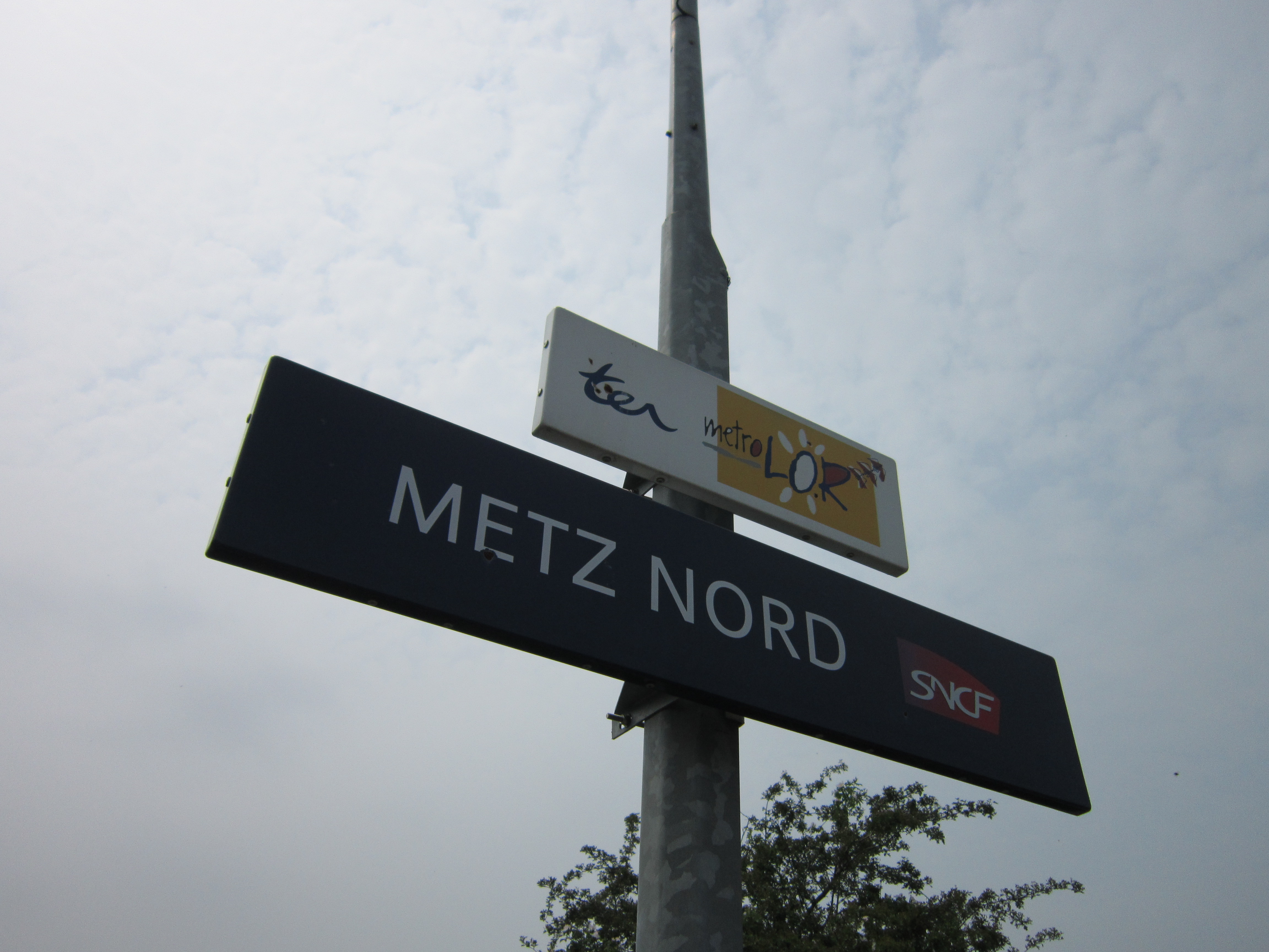 Panneau mentionnant l'arrivée en halte ferroviaire de Metz Nord.